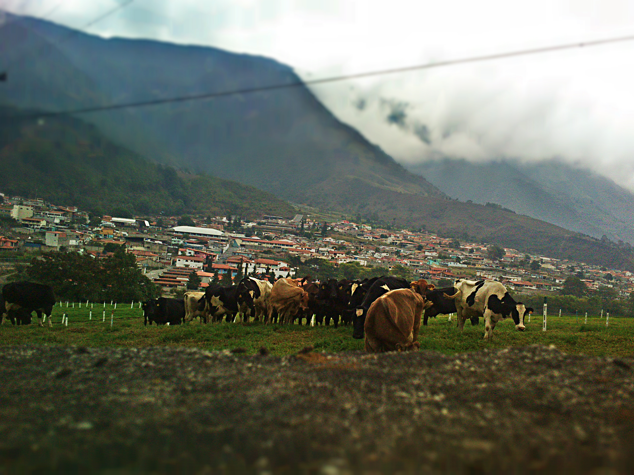 Población de Bailadores al fondo, Mérida